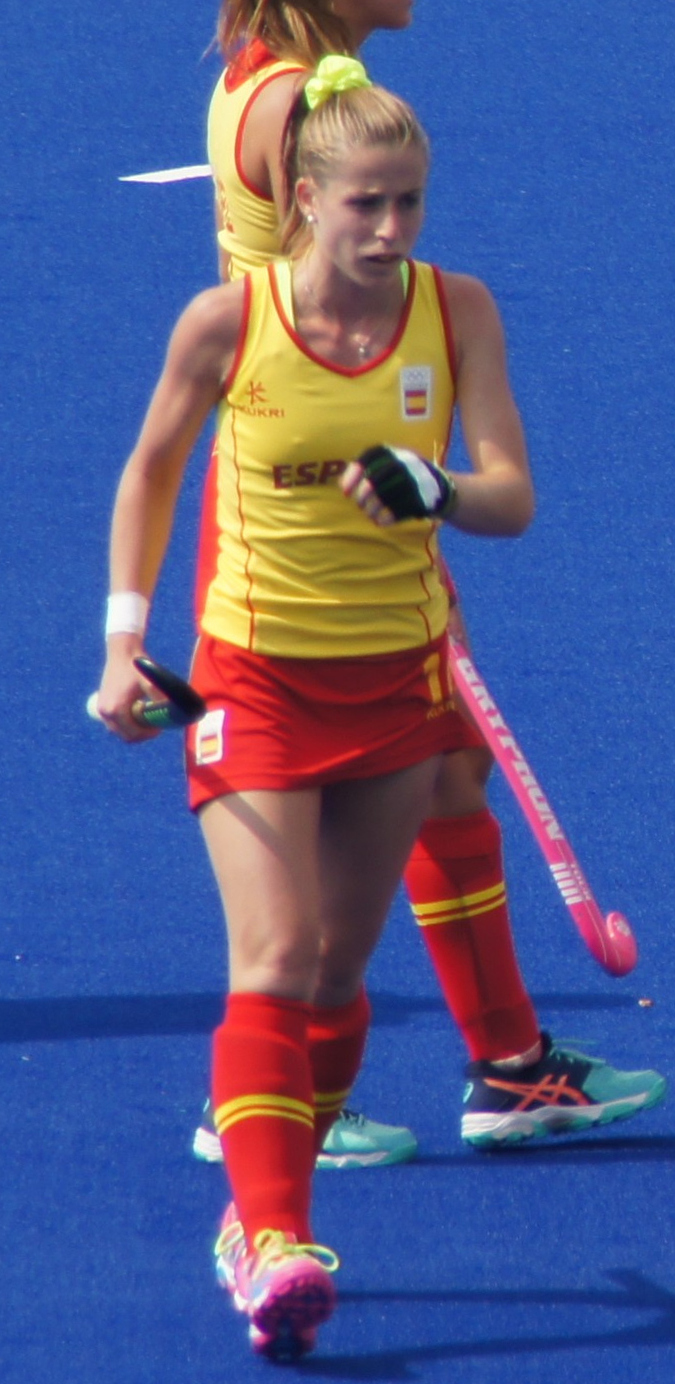 Rio 2016.Hóquei na grama. Feminino. Holanda x Espanha. 42